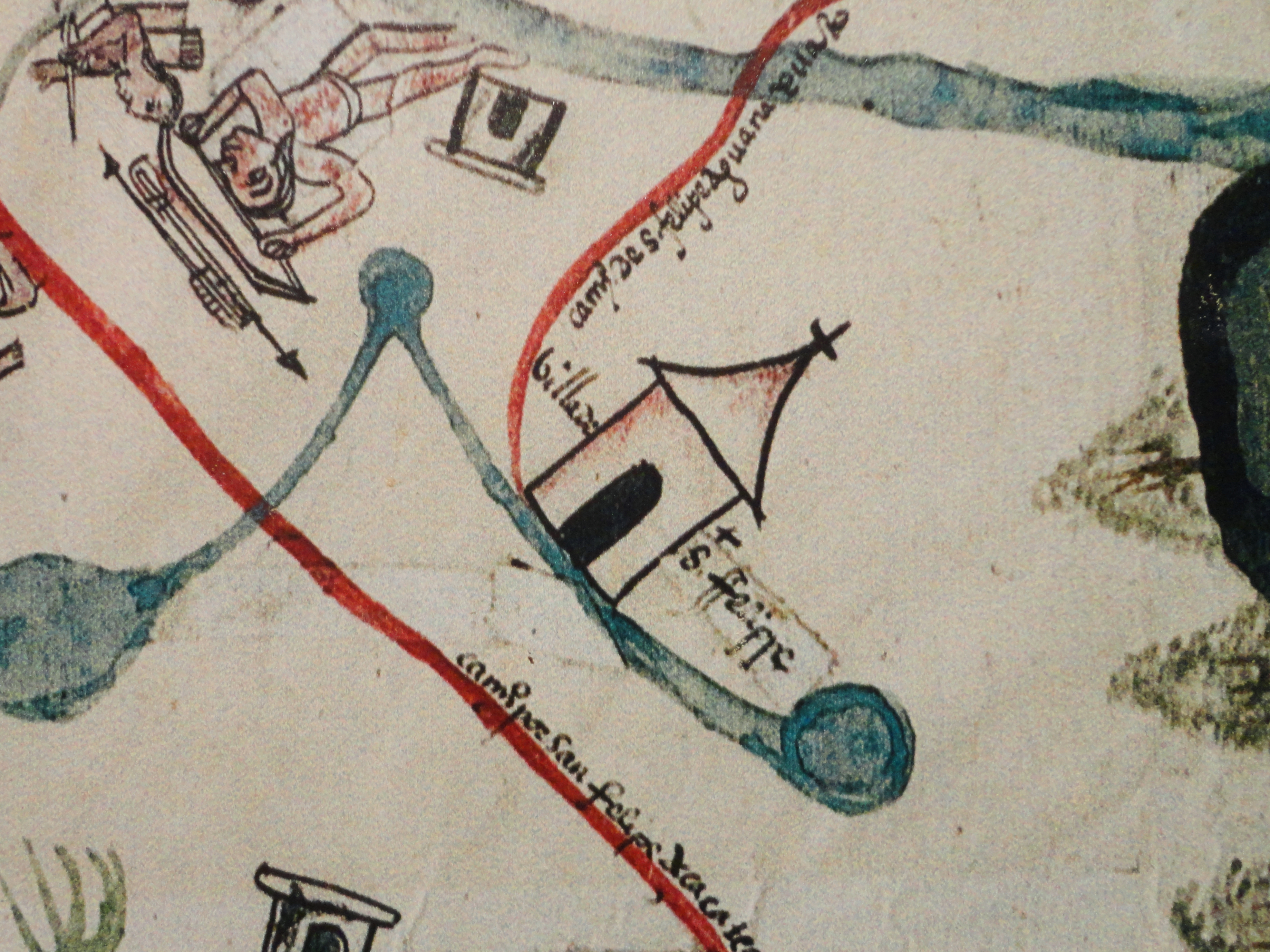 Detalle de Mapa de San Miguel y San Felipe de los Chichimecas (1580). Biblioteca de la Real Academia de Historia, Madrid, España.